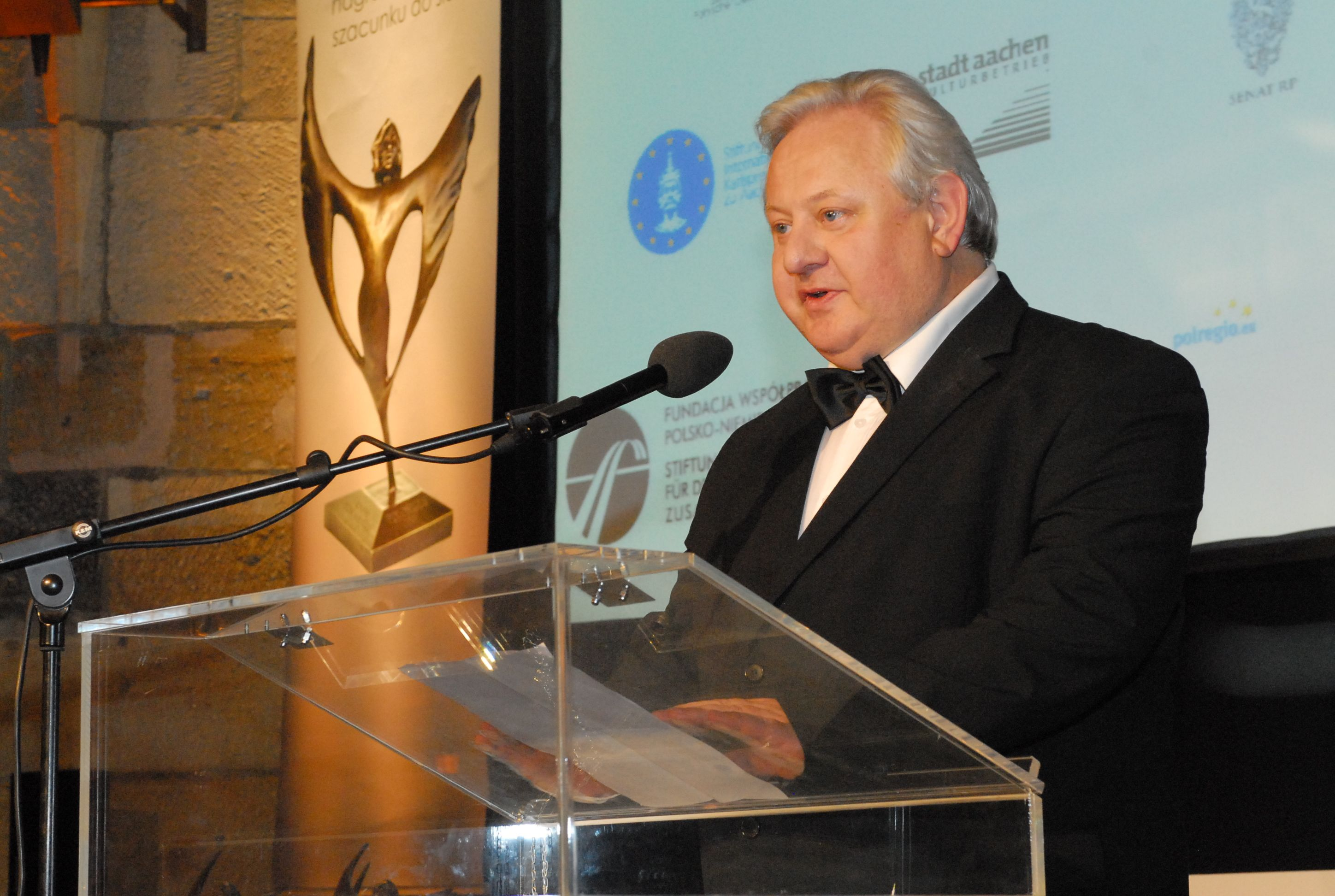 Gala rozdania statuetek POLONICUS 2011